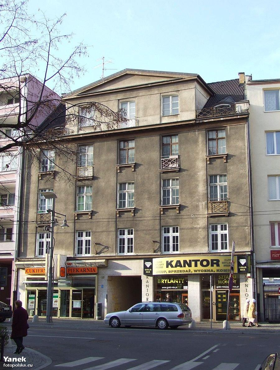 Kamienica na Świętojańskiej pod nr 10.